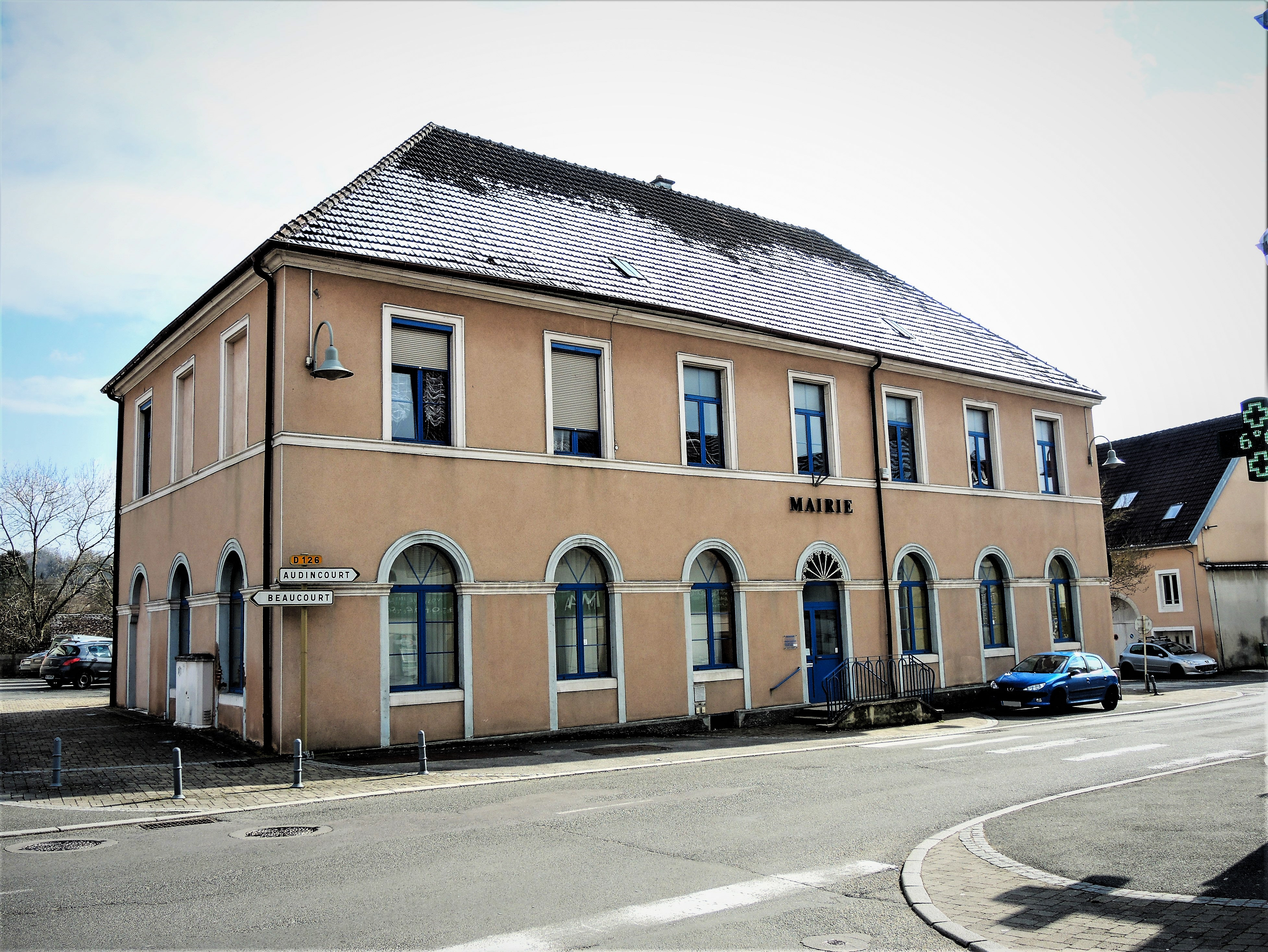 Mairie du village de Dasle. Doubs